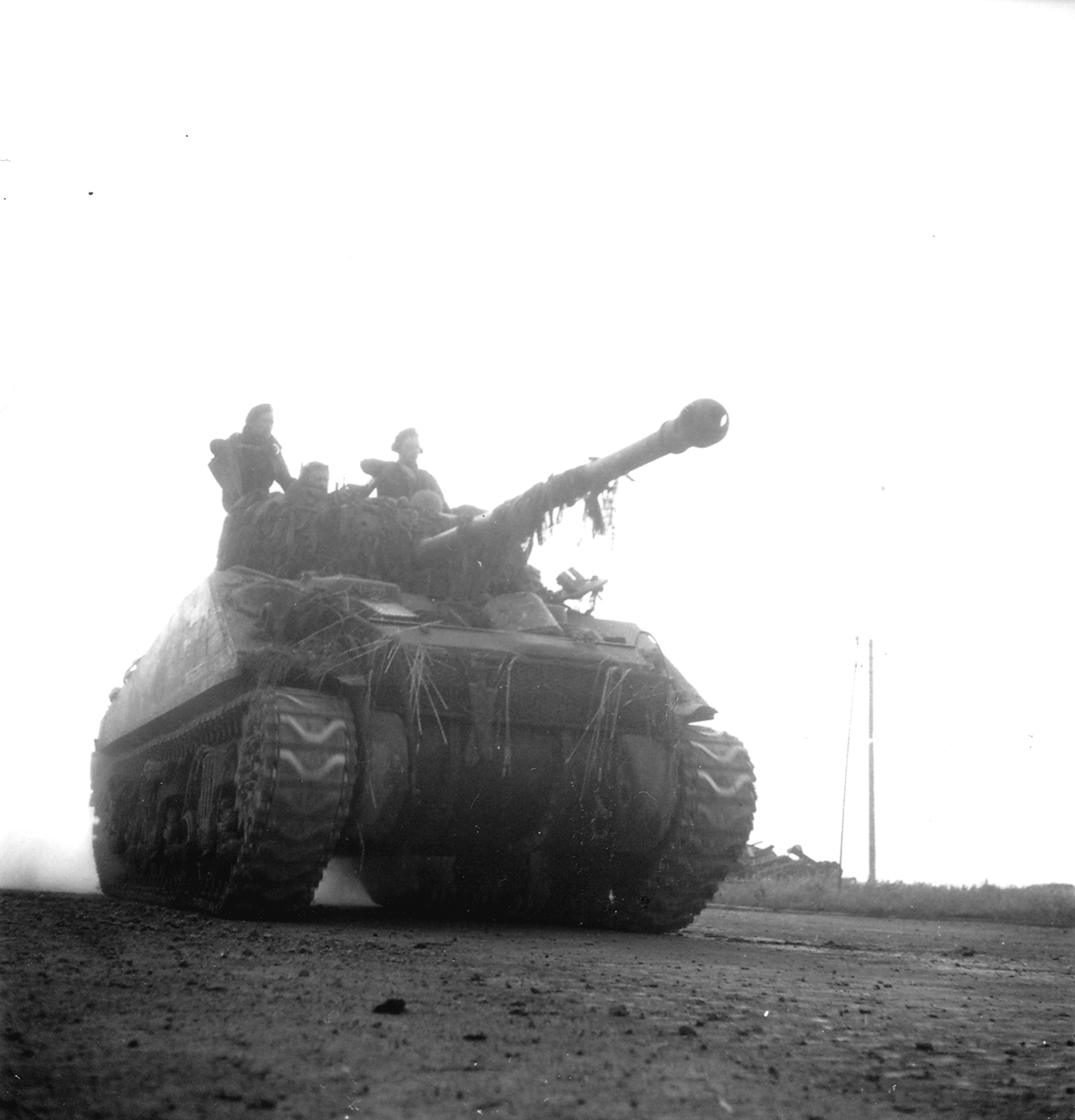 Un char britannique et son équipage roule sur une route de terre à l'aube.